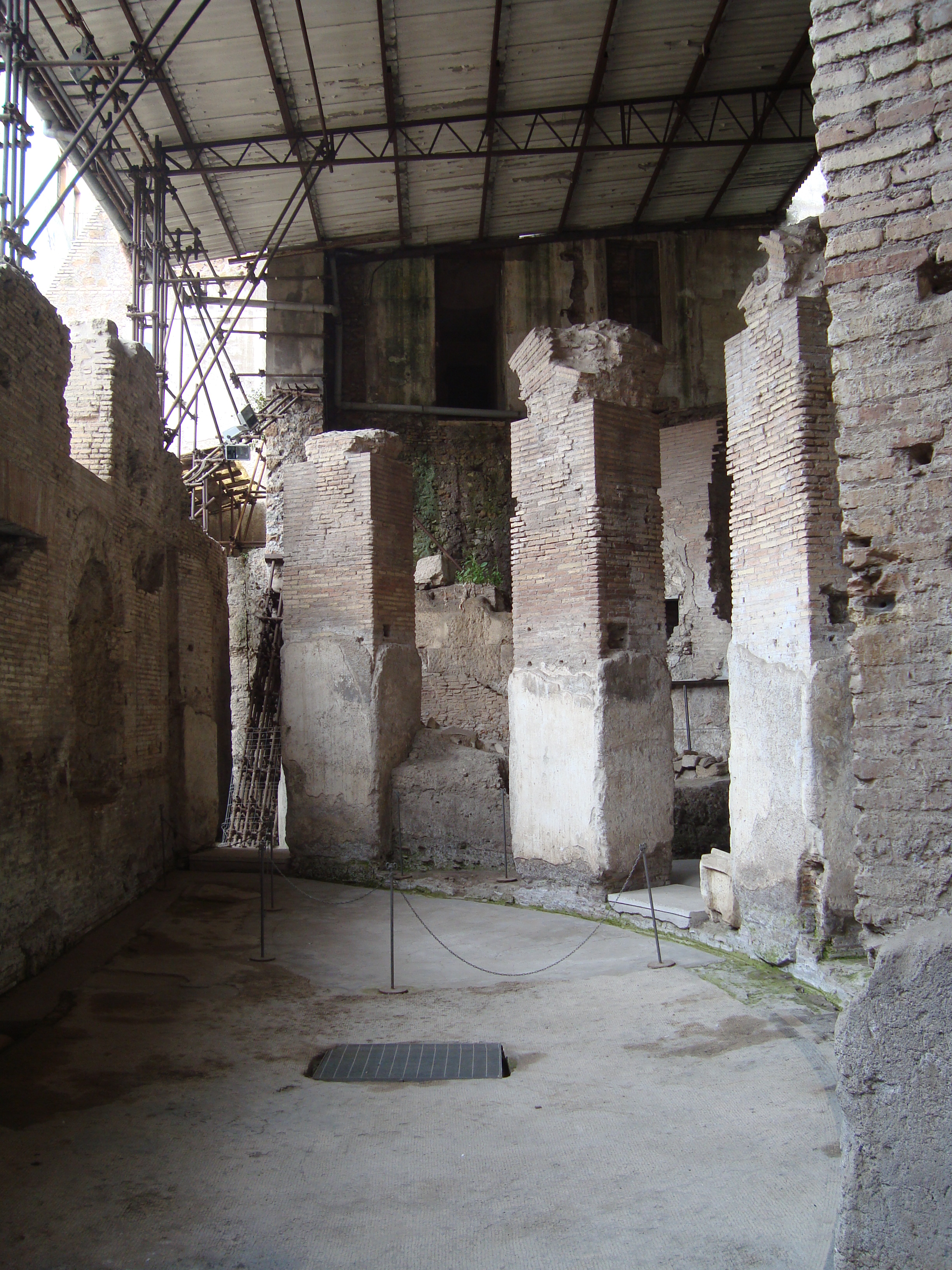 Crypta balbi, esedra